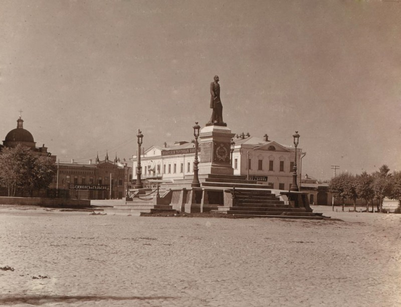 Памятник Александру II, который до революции стоял на Кафедральной площади Екатеринбурга (ныне - площадь 1905 года)